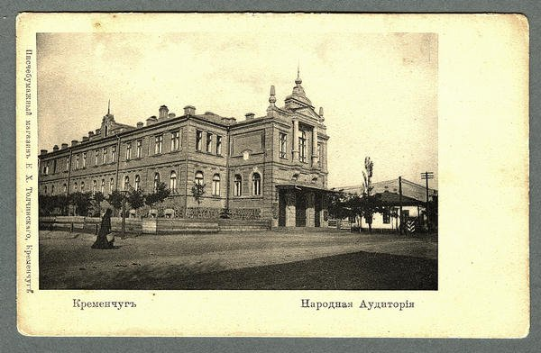 Здание Пушкинской народной аудитории в Кременчуге, до 1917 года